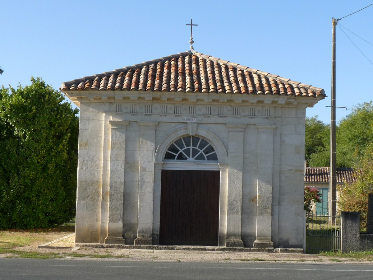 chapelle St-Roch, Lescarpon, Queyrac, Gironde, France